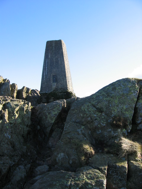 Carron Crag